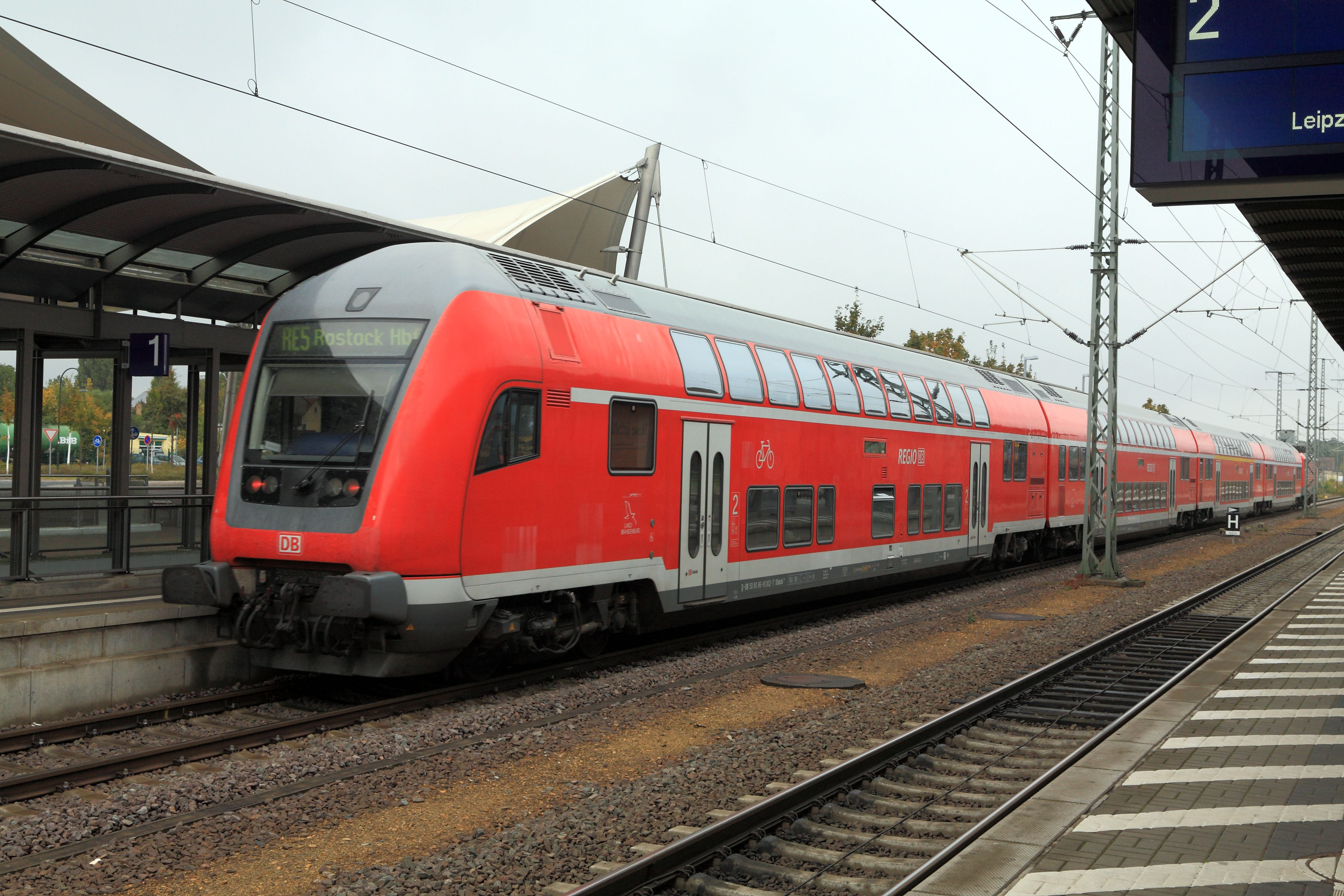 Klimatisierter Doppelstockwagenzug für 160km/h, Regionalexpress Rostock–Wittenberg und zurück.